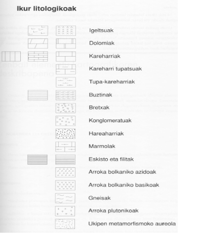 litologiaeuskaraz